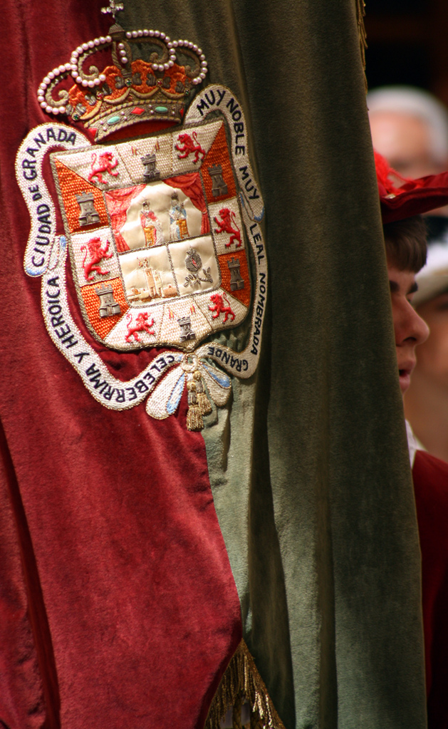 Procesión de Corpus Christi en la ciudad española de Granada, el 11 de junio de 2011.